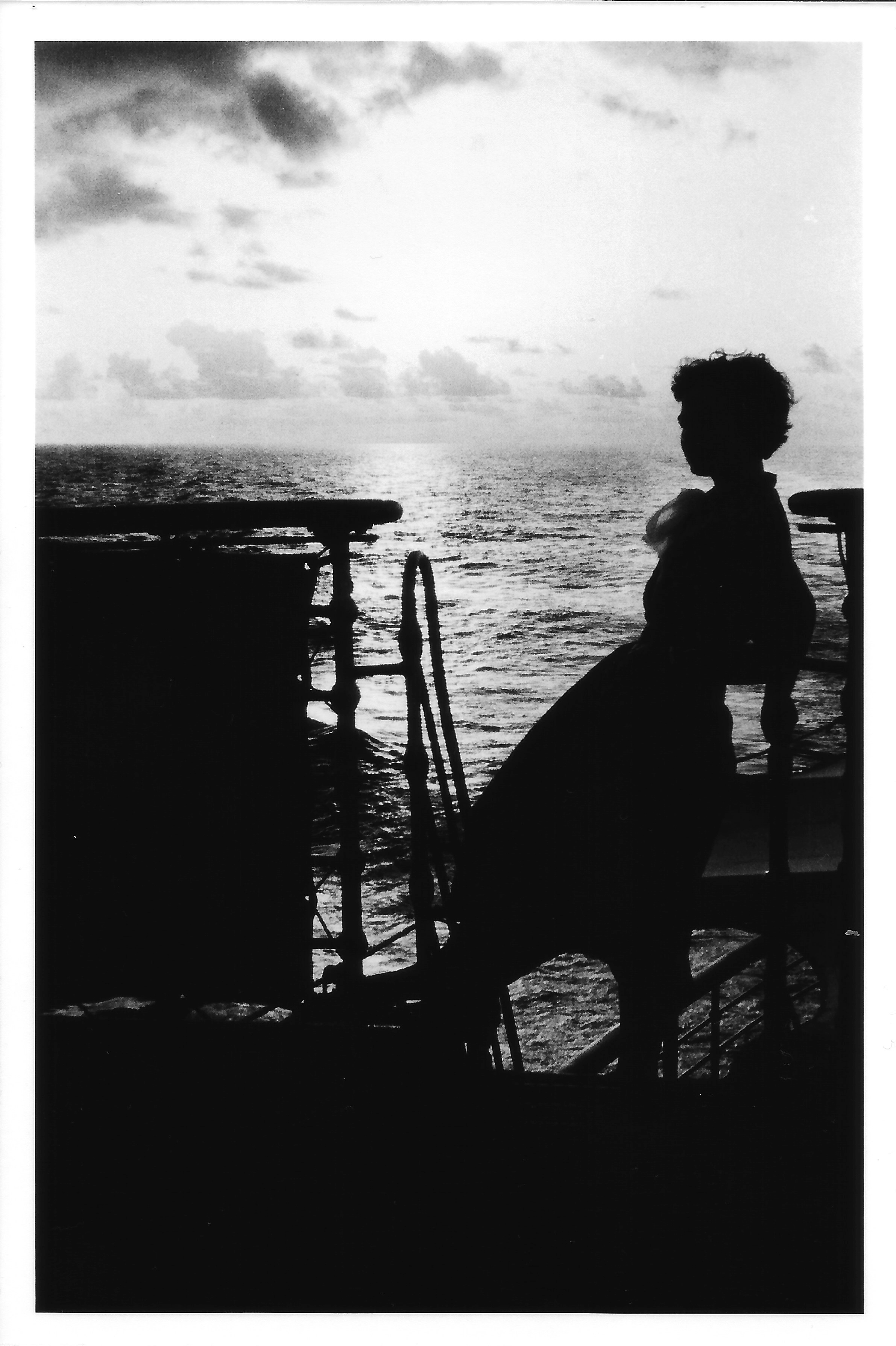 Viagem de navio 1951